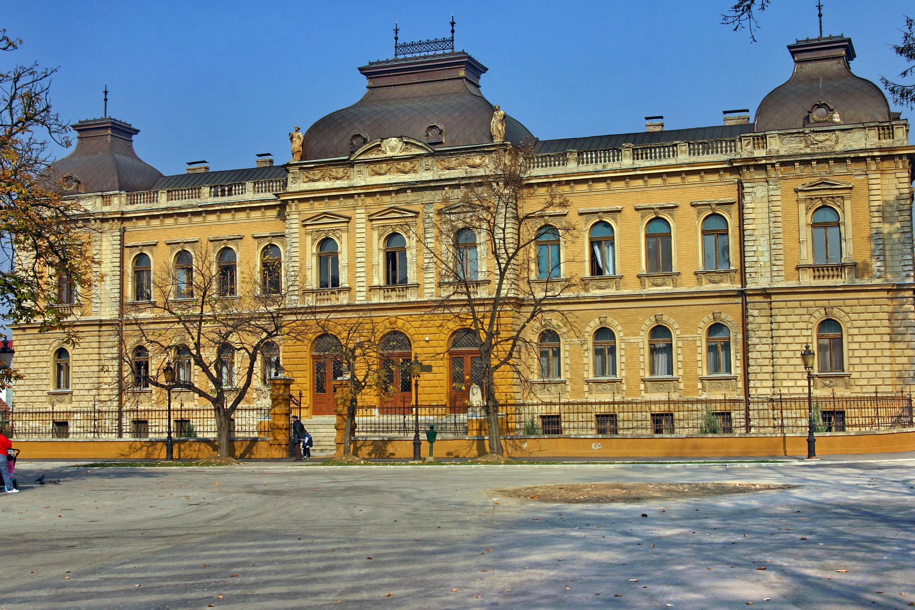 Богословија Светог Арсенија Сремца. Сремски Карловци